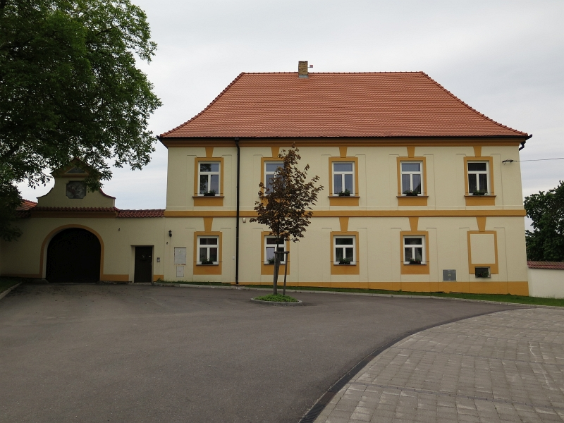 Fara, Malé náměstí 8, Ševětín.